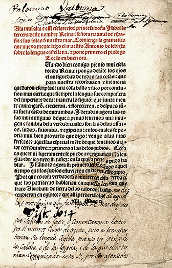 Incunable conservado por la Biblioteca Histórica de la Universidad Complutense de Madrid.